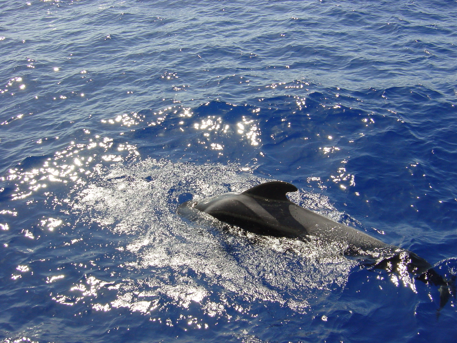 Globicephala melas.